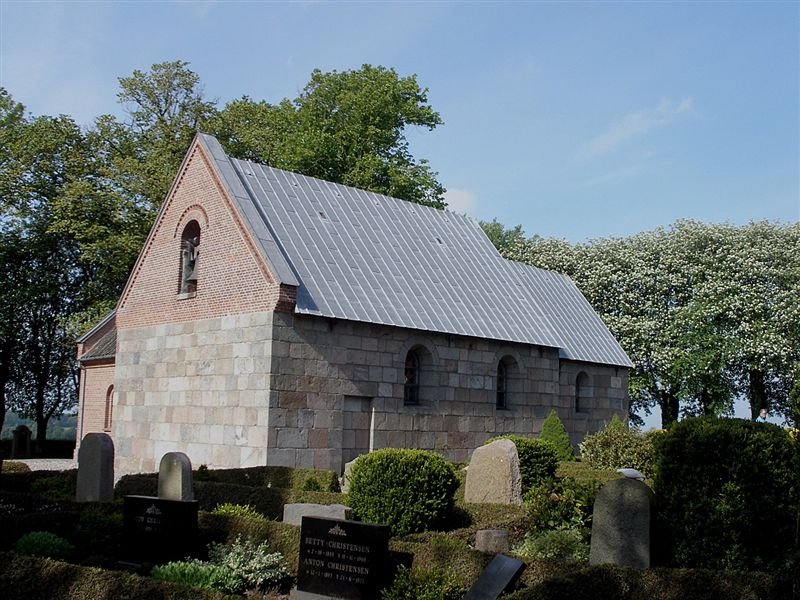 Komdrup Kirke i Danmark. Komdrup kirke